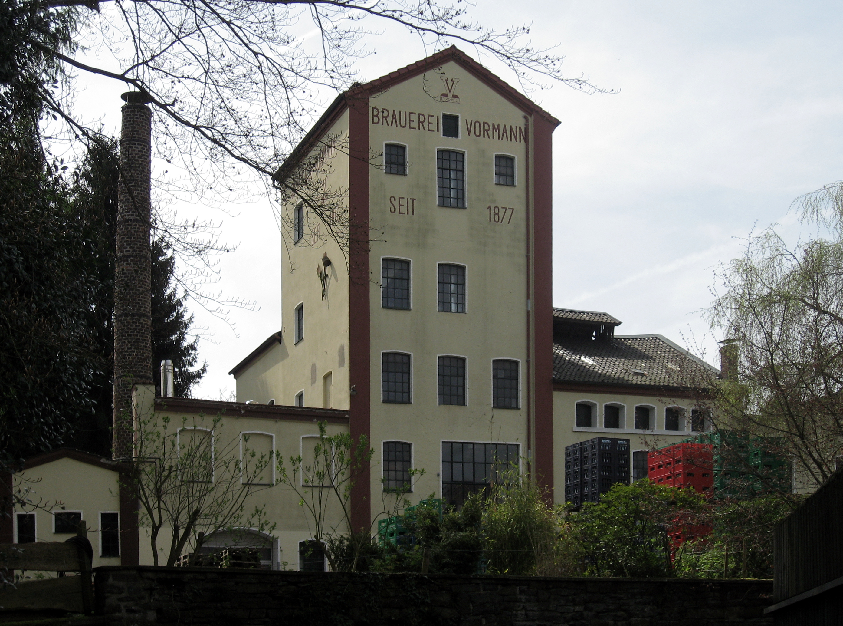 Deutschland, NRW, Westfalen, Brauerei Vormann, Hagen-Dahl